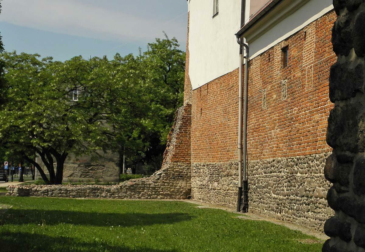 Pozostałość murów miejskich.